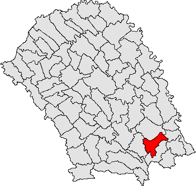 Categorie:Hărţi ale judeţului Botoşani